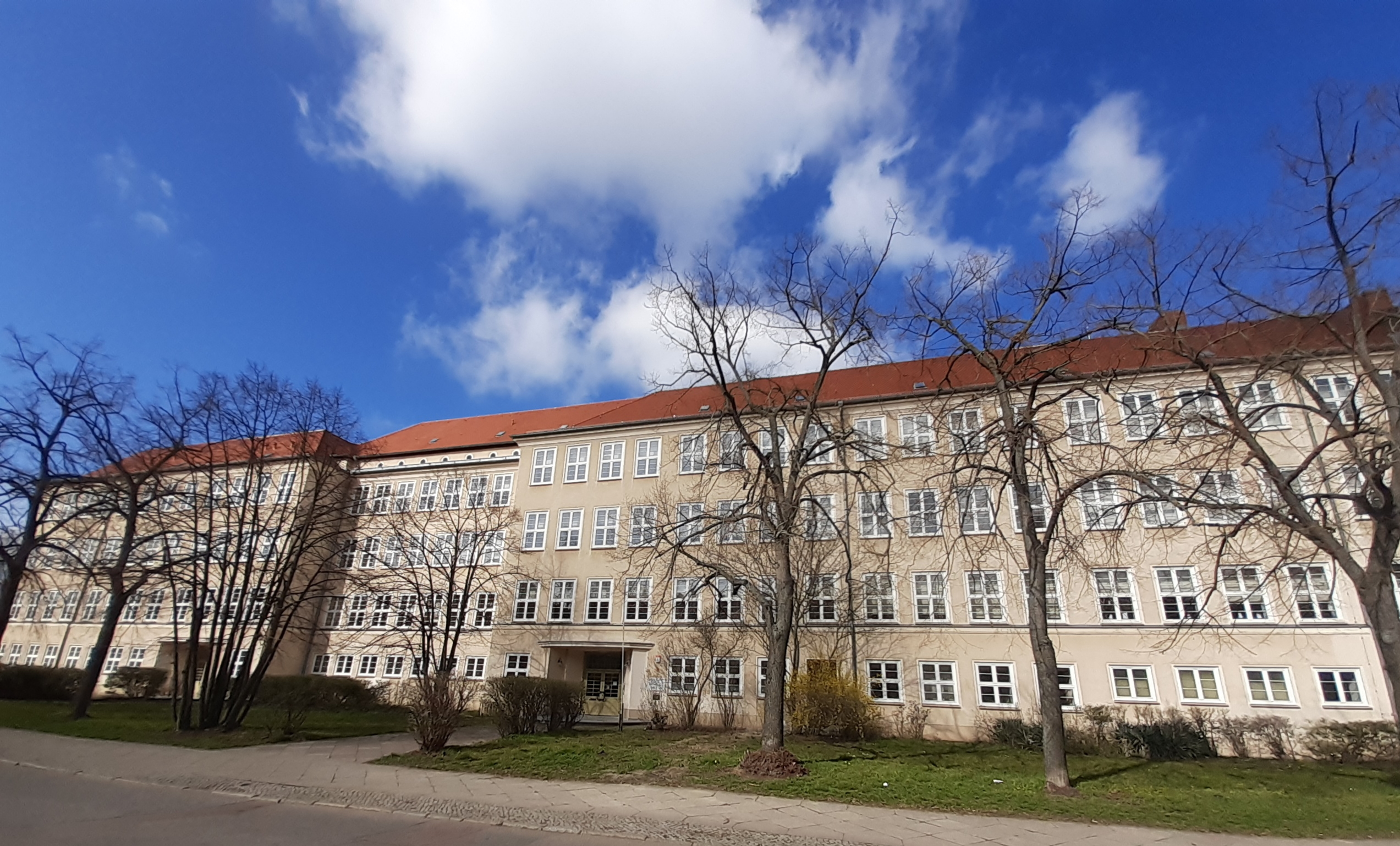 Sekundarschule Halle-Süd, Ammendorf, Kurt-Wüsteneck-Straße 21